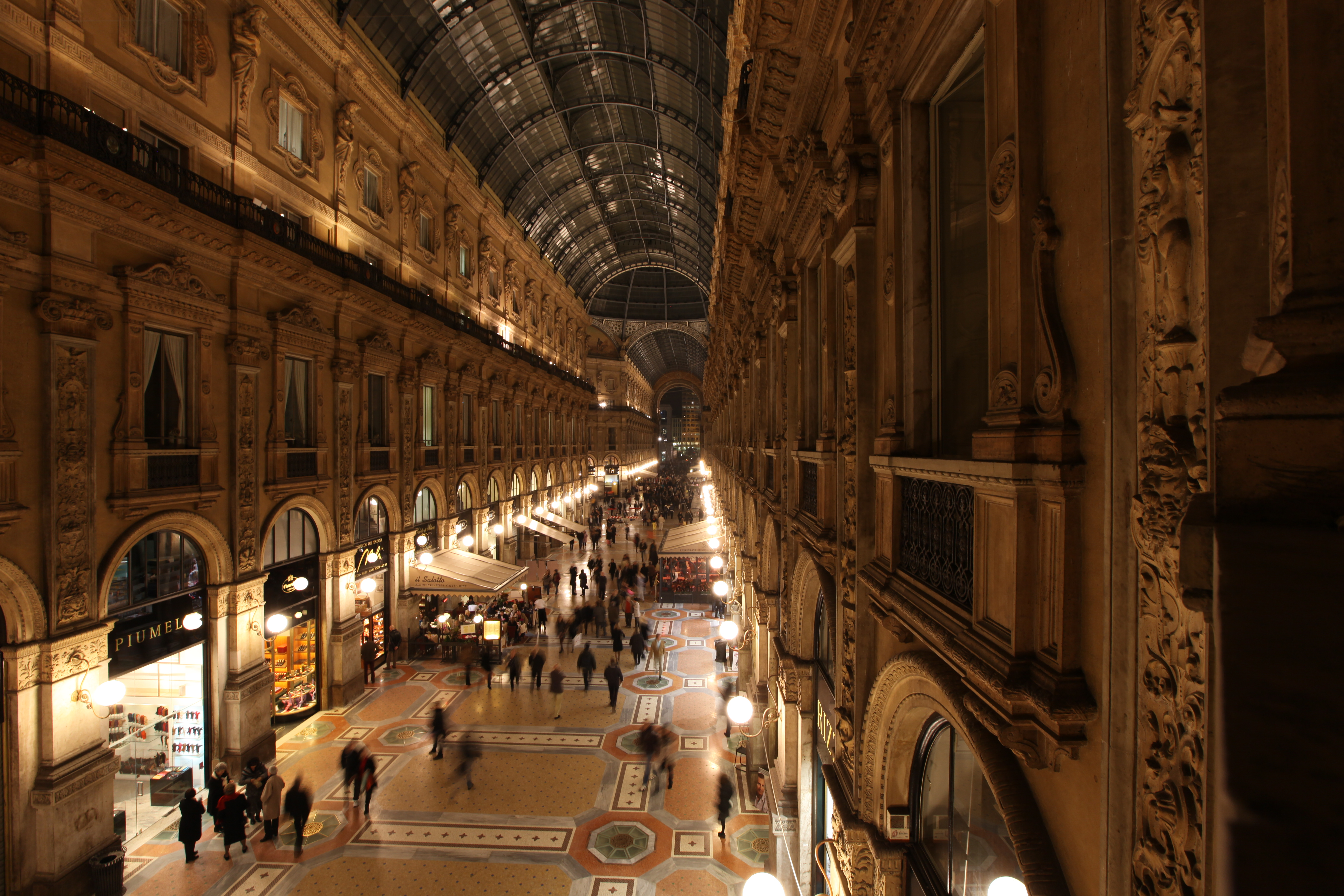 Galleria Vittorio Emanuele II from TownHouse Hotel